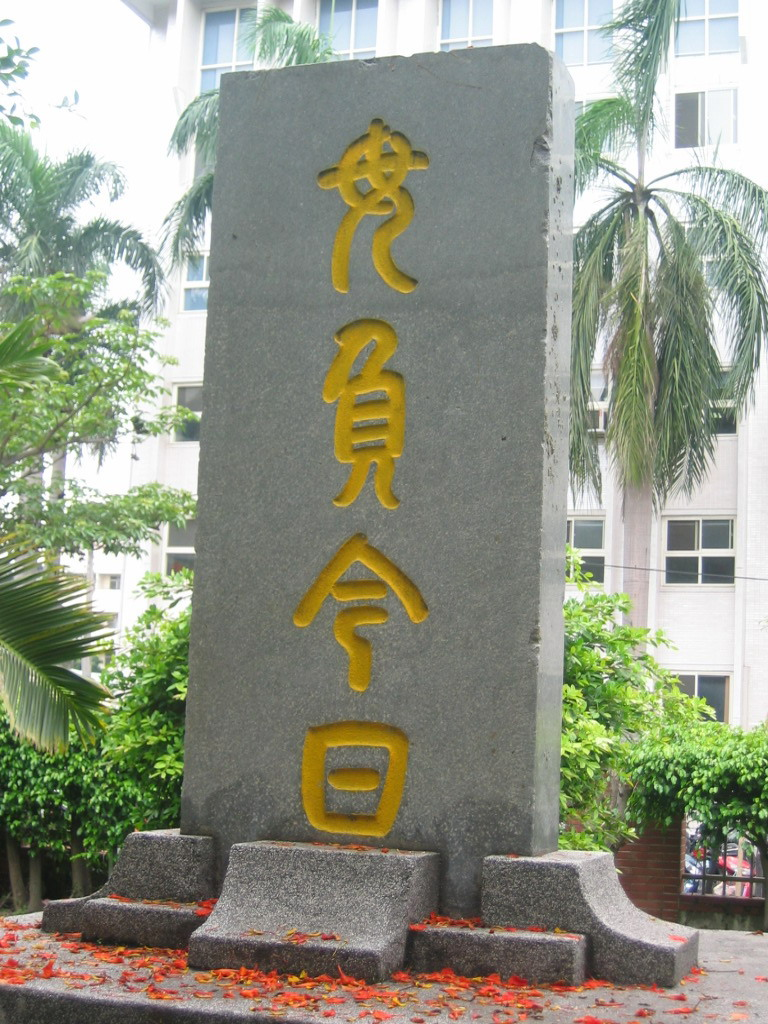 中文（台灣）: 台中一中之毋負今日碑。